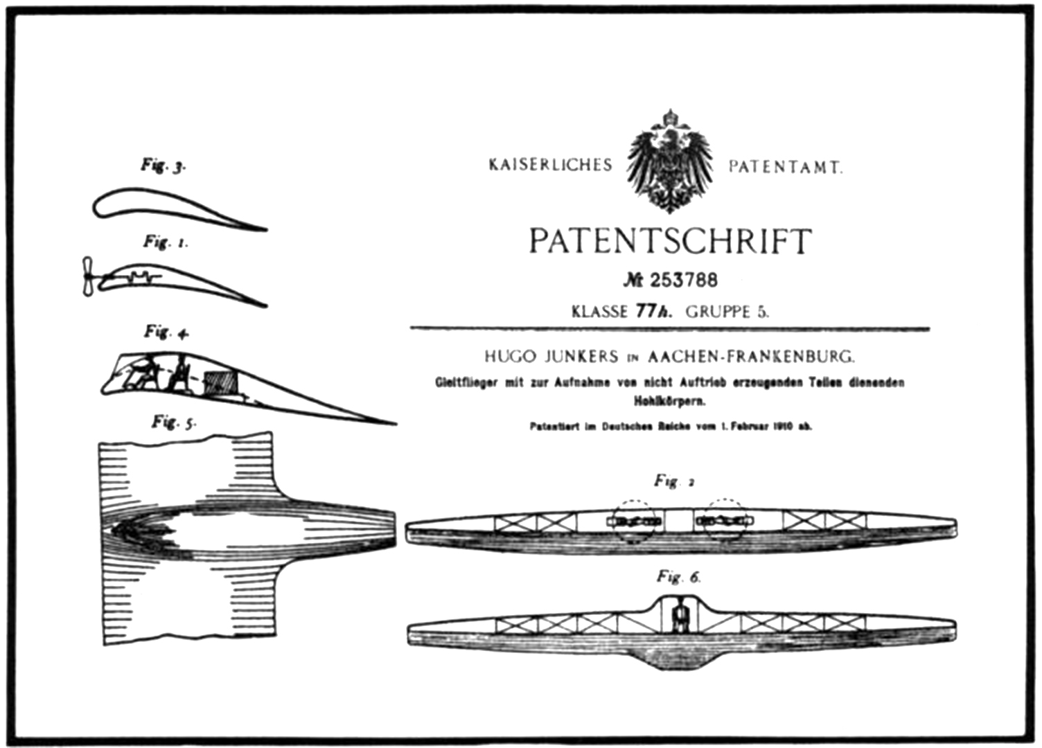 Kaiserliches Patentamt, Patentschrift Nr. 253788 von Hugo Junkers: Gleitflieger mit zur Aufnahme von nicht Auftrieb erzeugenden Teilen dienenden Hohlkörpern., Abbildungen (Fig.) 1 bis 6